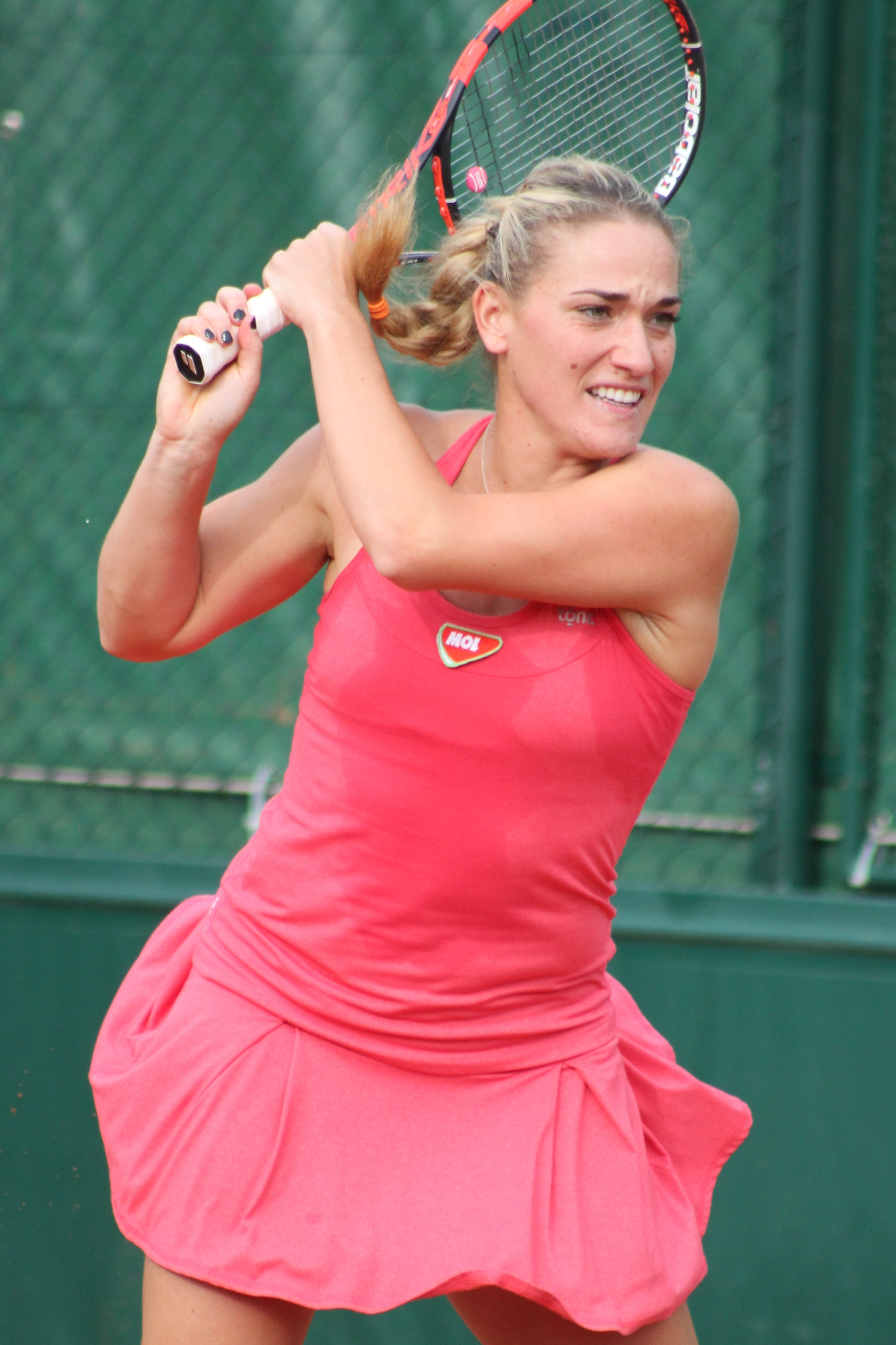 Babos RG15 (9)